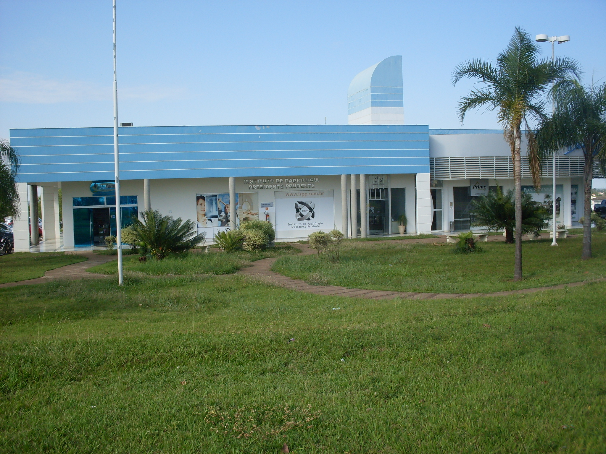 Centro Comercial Damha Center.